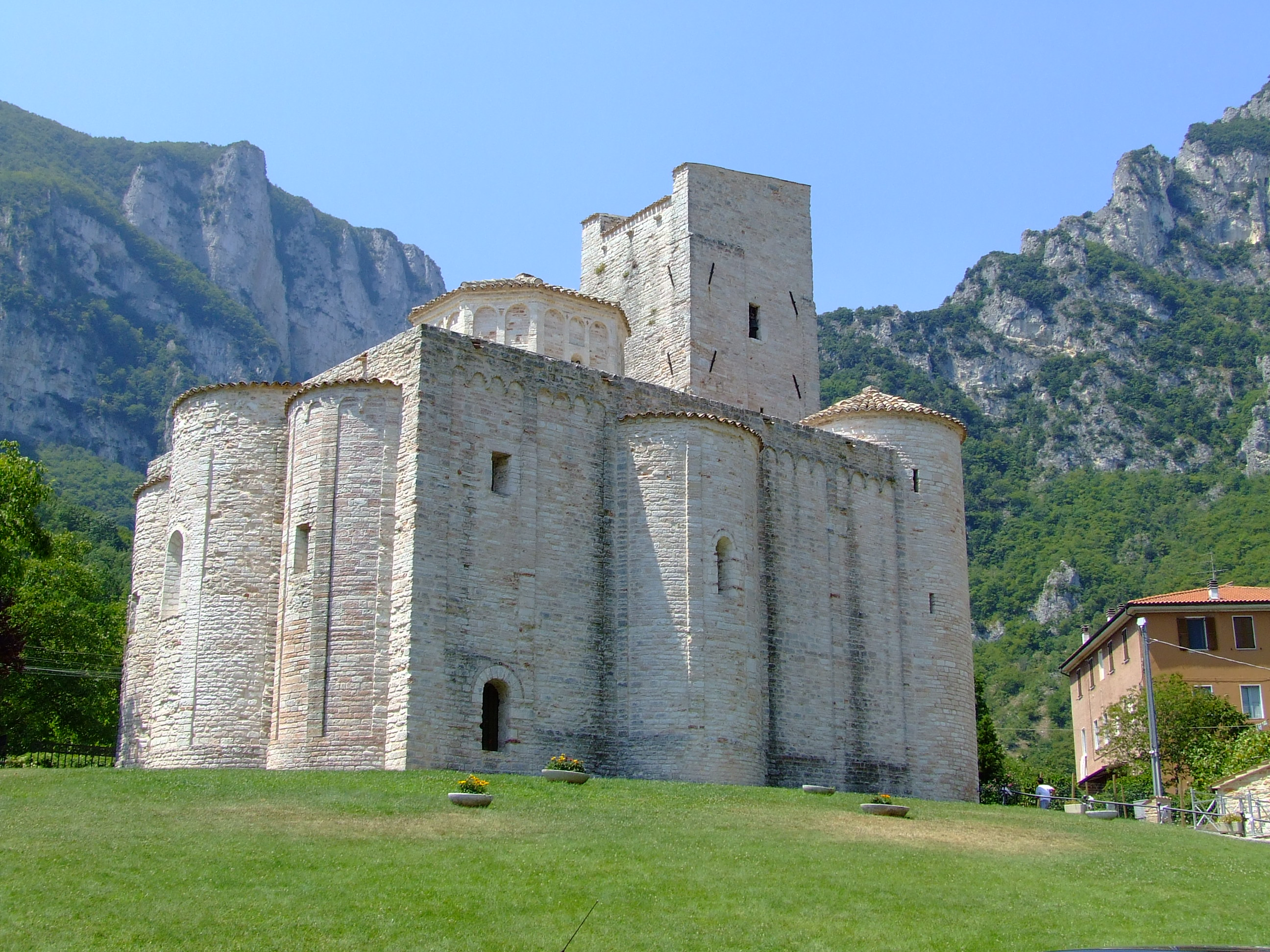 Abazia di San Vittore (Genga)